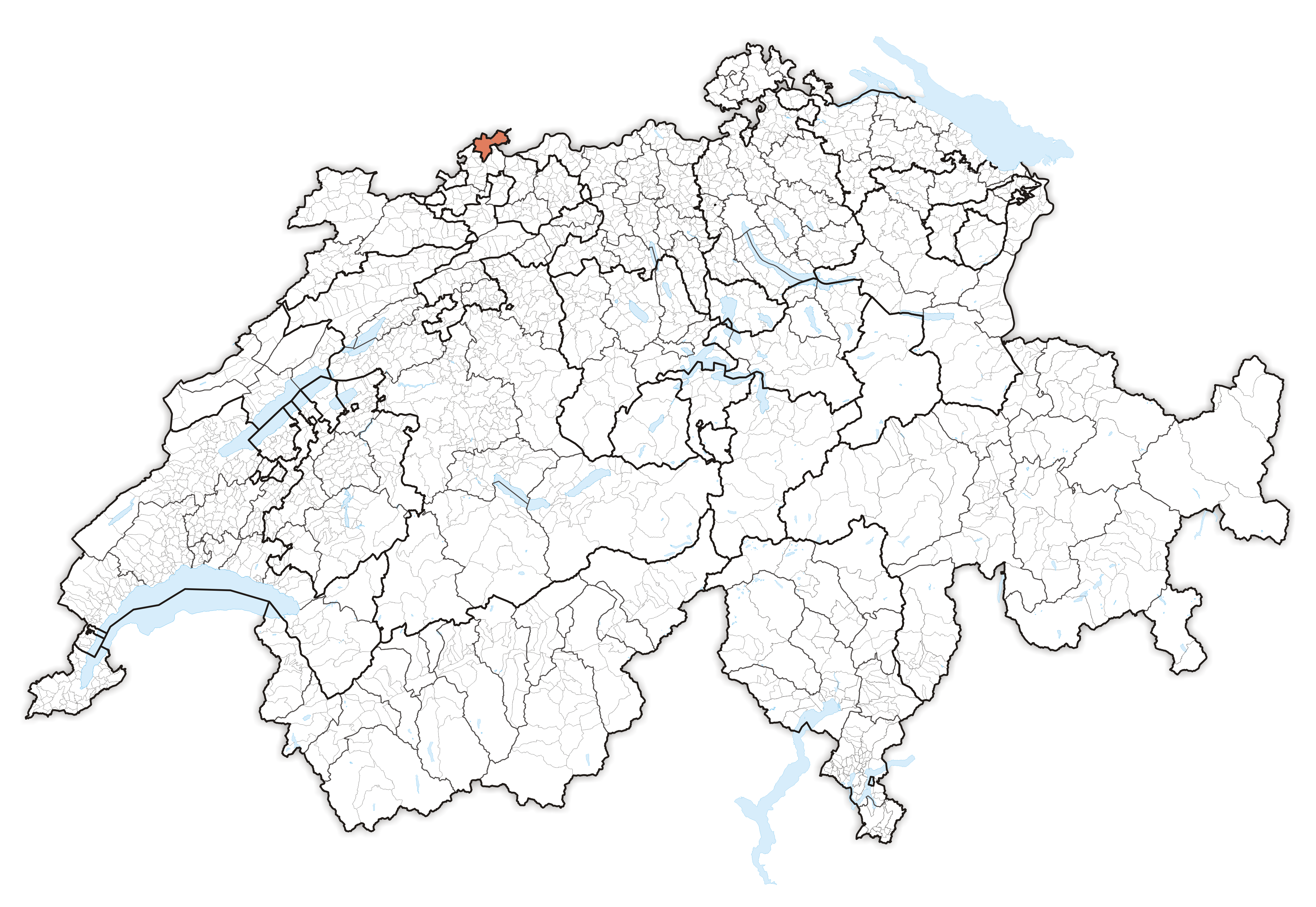 Canton Basel Stadt